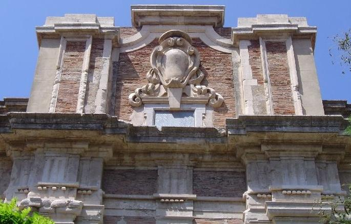 Church Messina Chiesa di San Giovanni di Malta